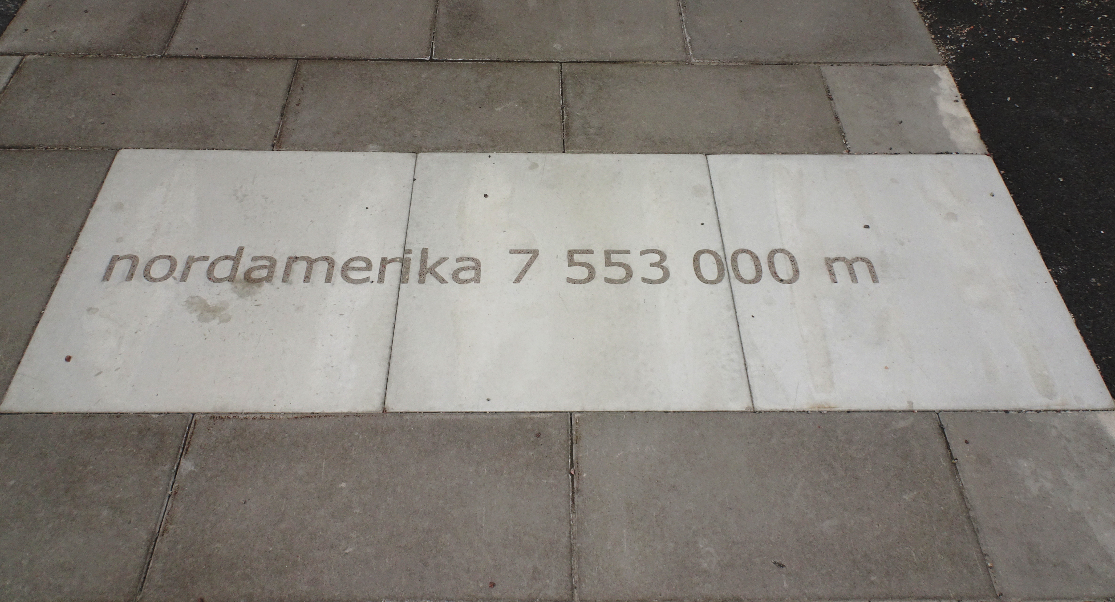 Sadelmakarbron text: "nordamerika 7 553 000 m"